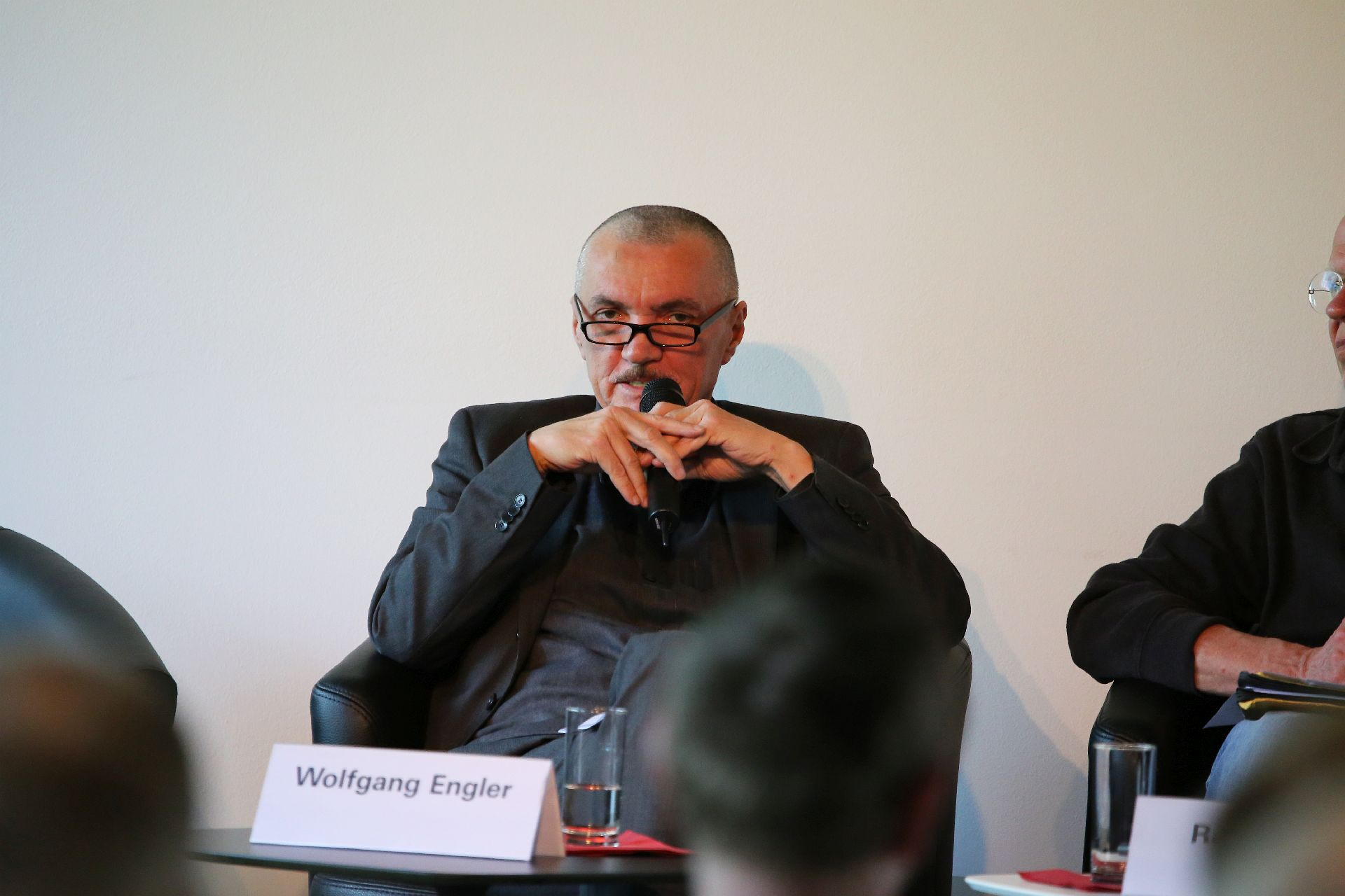 Gespräch über Gerechtigkeit und Gleichheit 14 Uhr Stephan Lessenich und Wolfgang Engler diskutieren über Zukunft und Gegenwart Mehr Lohn statt Verzicht. Spaltung der Belegschaft verhindern 16:30 Uhr Berlin, 24.4.2015 Im Rahmen der Linken Woche der Zukunft